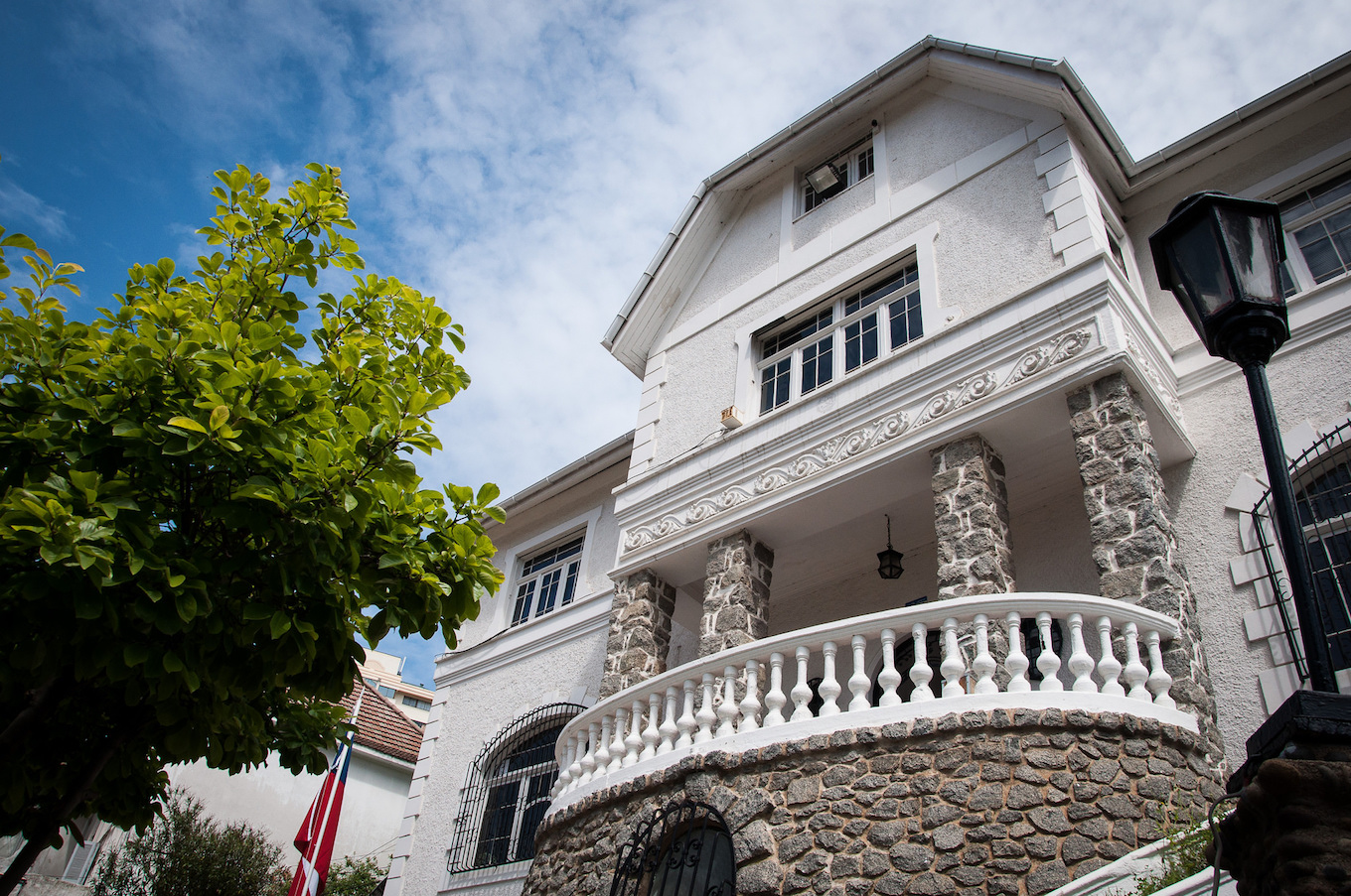 Traslaviña UPLA